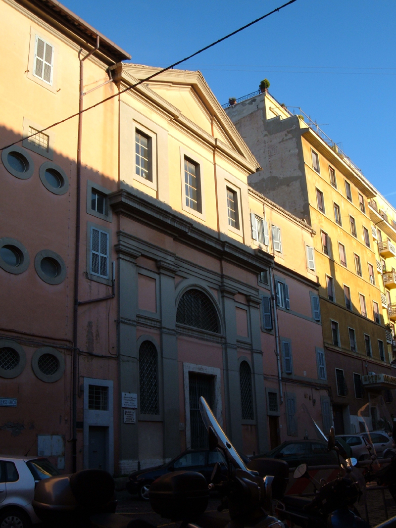 Chiesa di Santa Maria Annunziata delle Turchine, a Roma, nel rione Monti. Chiesa sconsacrata.